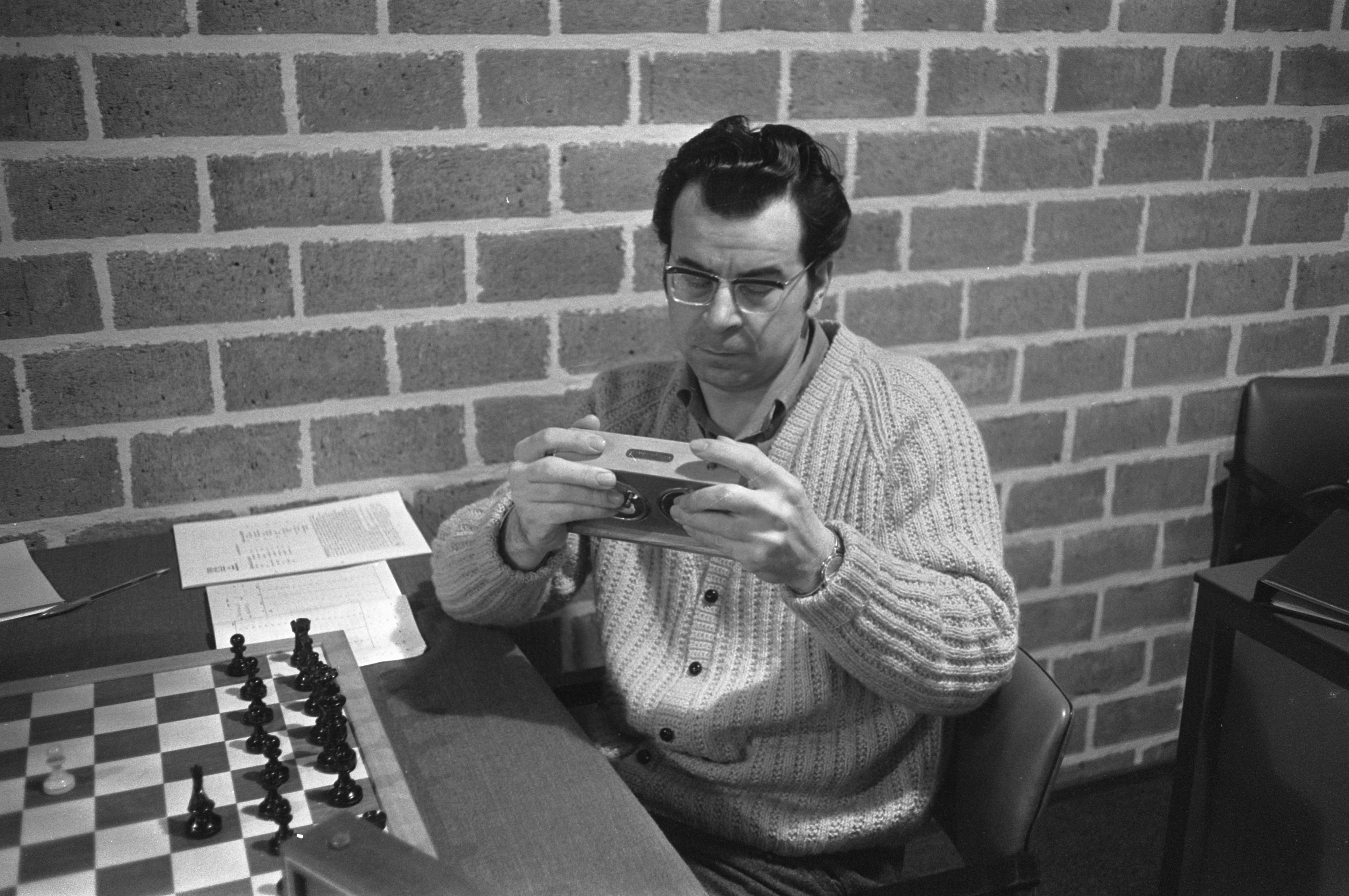 Collectie / Archief : Fotocollectie Anefo Reportage / Serie : [ onbekend ] Beschrijving : Hoogoven Schaaktoernooi te Beverwijk. Pal Benko (USA) tegen Taimanov. Benko probeert schaakklok te repareren Datum : 19 januari 1970 Locatie : Beverwijk Trefwoorden : klokken, schaken, sport Persoonsnaam : Benko Pal Fotograaf : Koch, Eric / Anefo Auteursrechthebbende : Nationaal Archief Materiaalsoort : Negatief (zwart/wit) Nummer archiefinventaris : bekijk toegang 2.24.01.05 Bestanddeelnummer : 923-1732